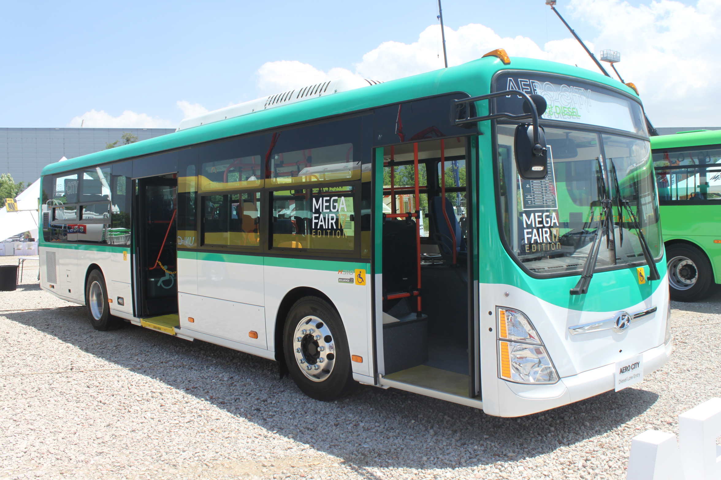 현대 뉴 슈퍼 에어로시티 저상버스 (디젤) 정측면